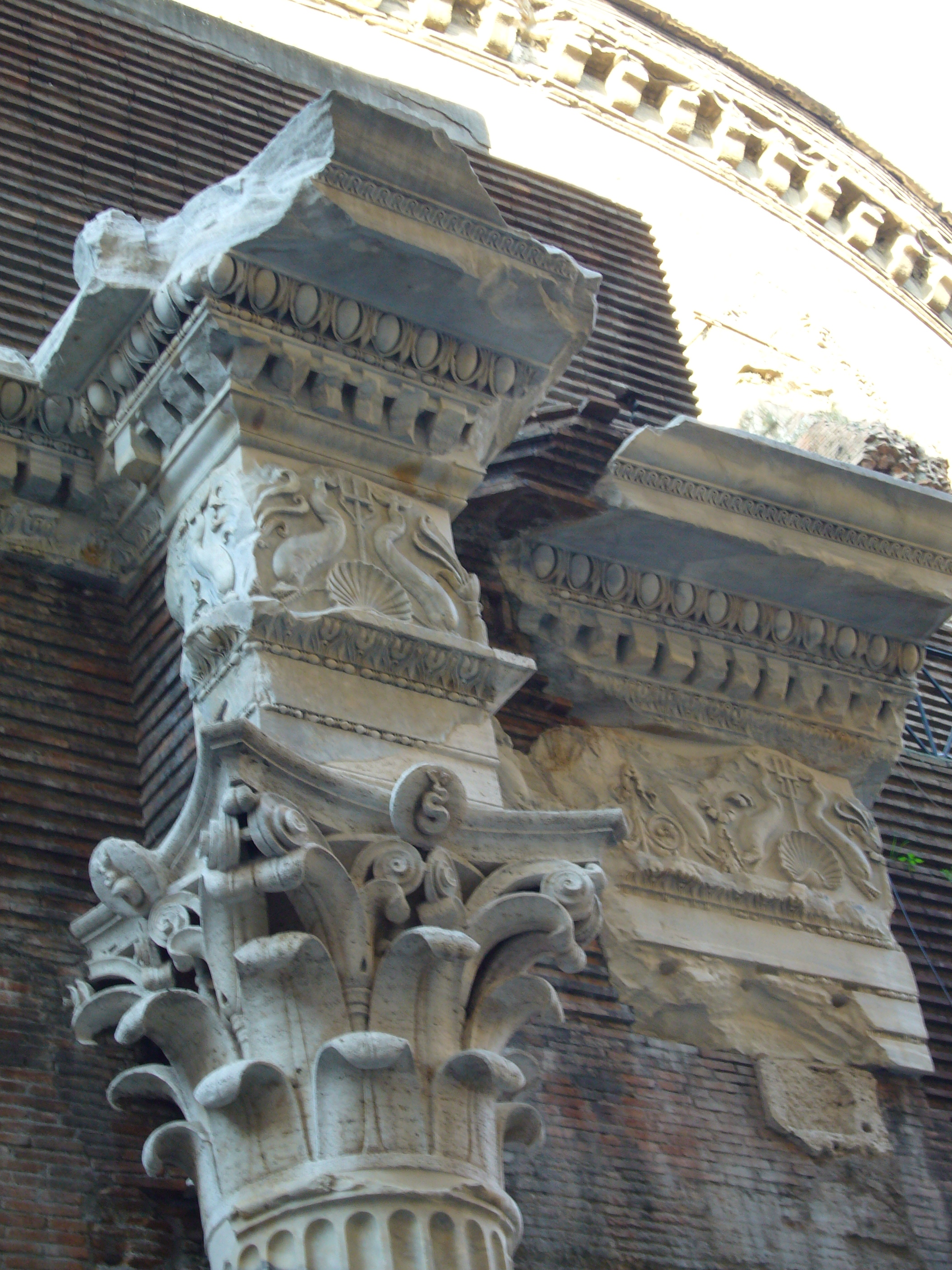 Roma, rione Pigna: tempio di Nettuno a via della Palombella, particolare